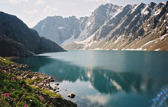 Terskei Alatoo. Karakol gorge. Alakol